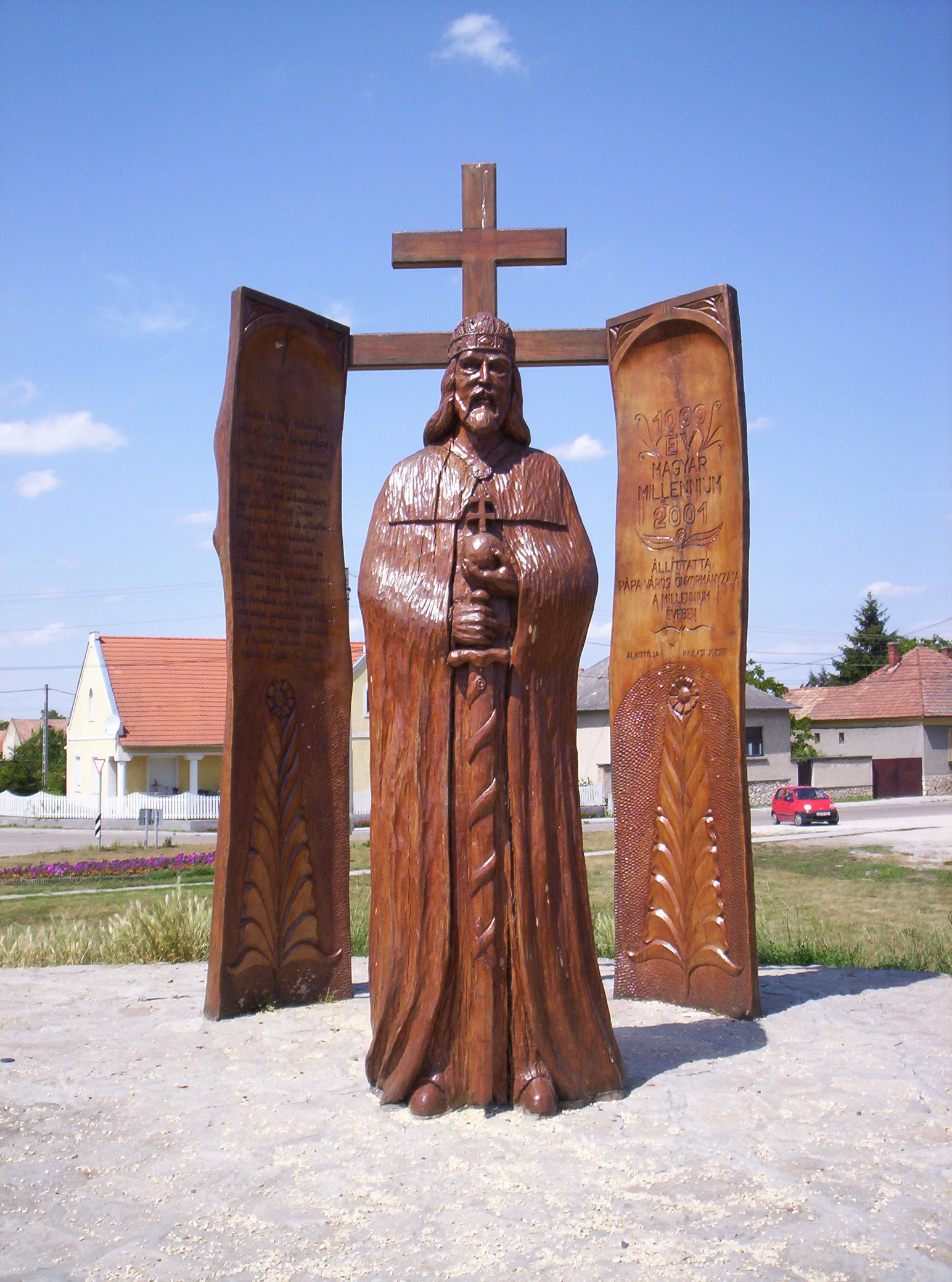 Statue of King Stephen I in the Millenary Memorial Park in Pápa, Hungary. Art by József Nyulasi I. István király szobra a pápai Millenniumi Emlékparkban. Nyulasi József alkotása.